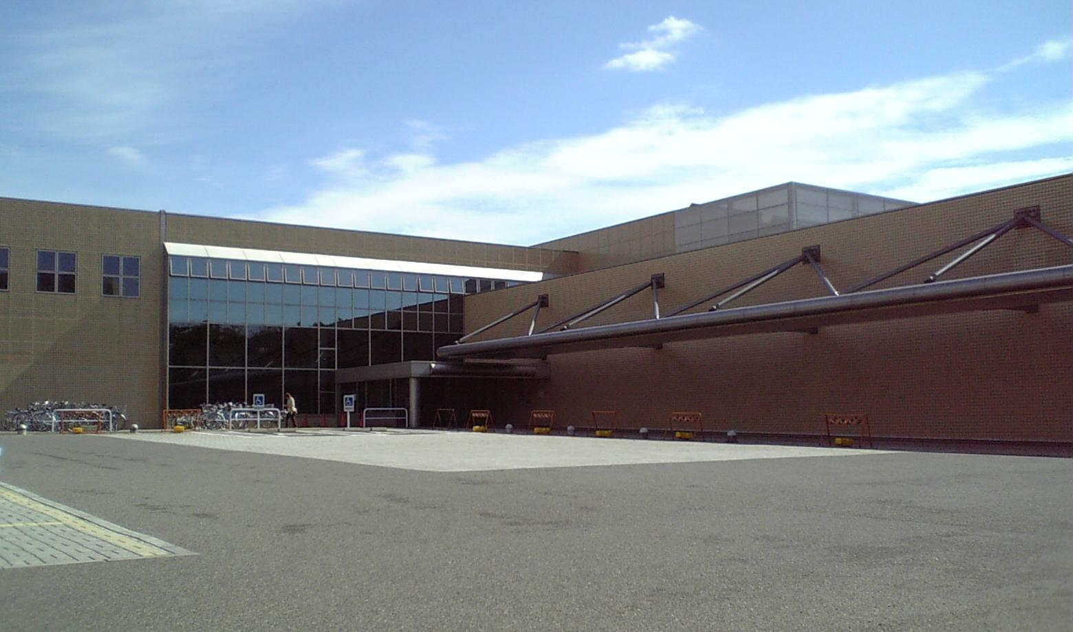 新潟県立図書館。